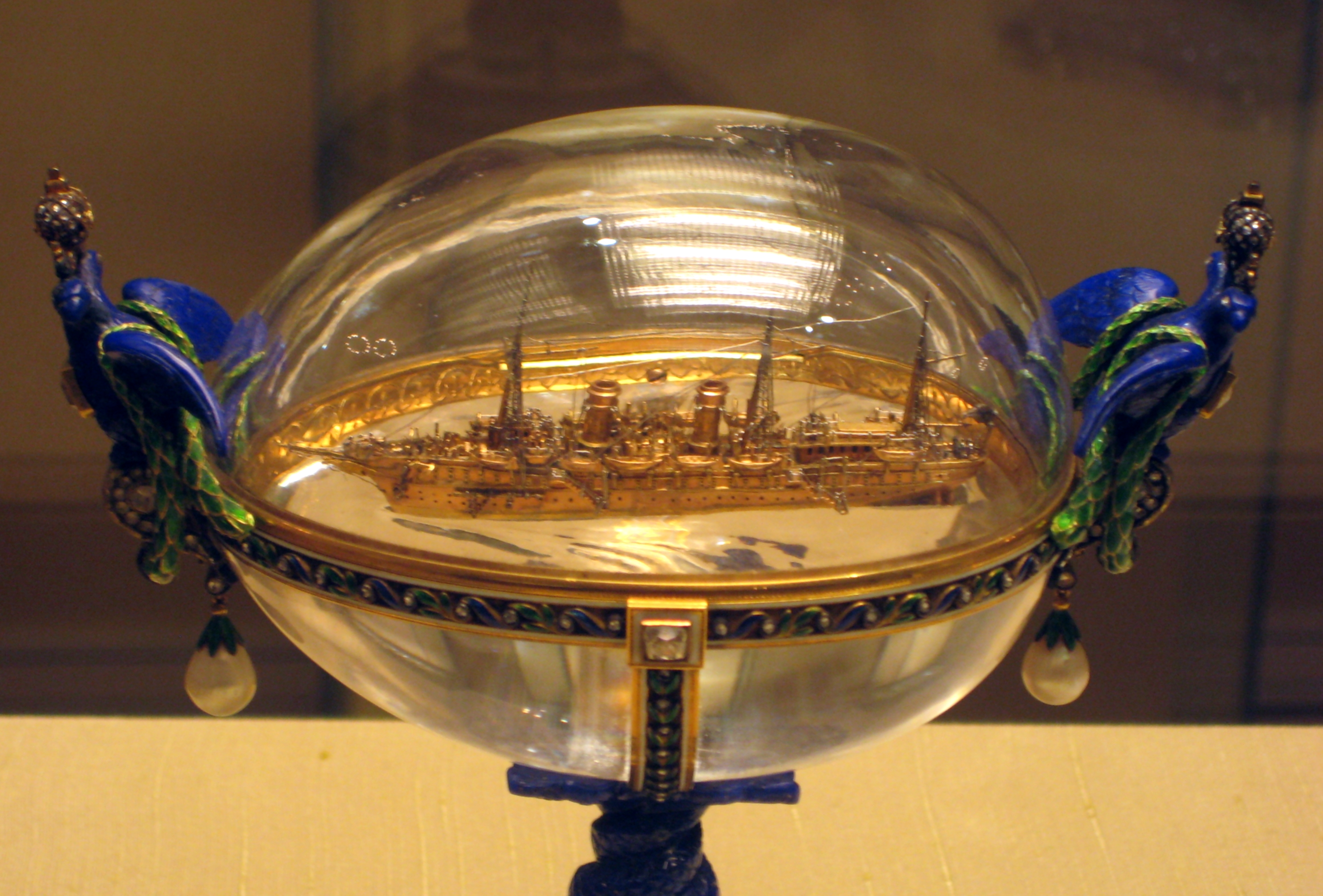 Яйцо Фаберже "Яхта Штандарт".